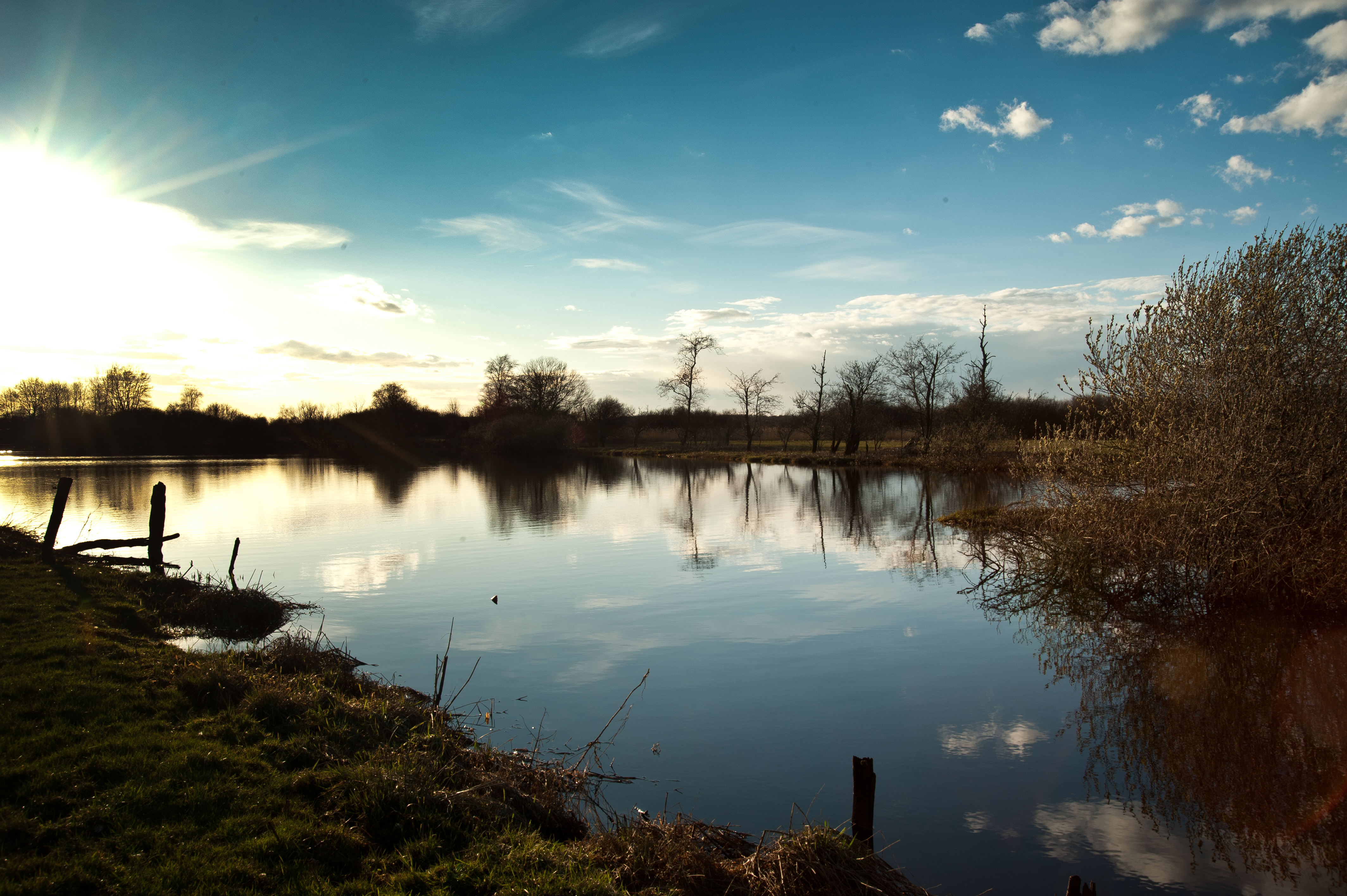 Abendstimmung mit Blick in NSG Wildes Moor bei Schwabstedt